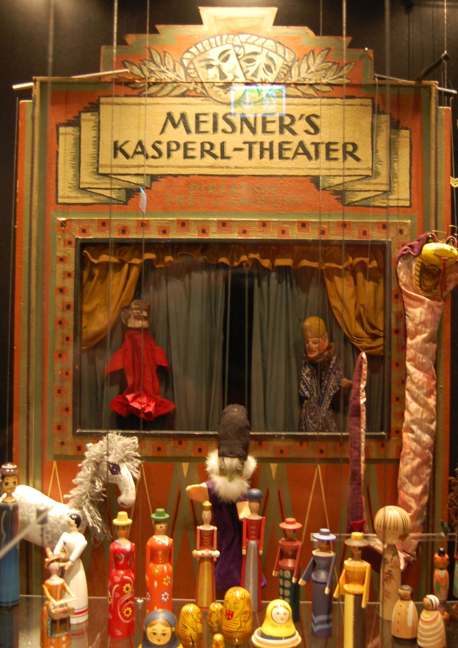 Altes Kaspertheater, bemalt von Heinz Kistler (1912-2004), "Maler der Rhön"; ausgestellt in der "Spielzeugwelt (Bad Kissingen)"